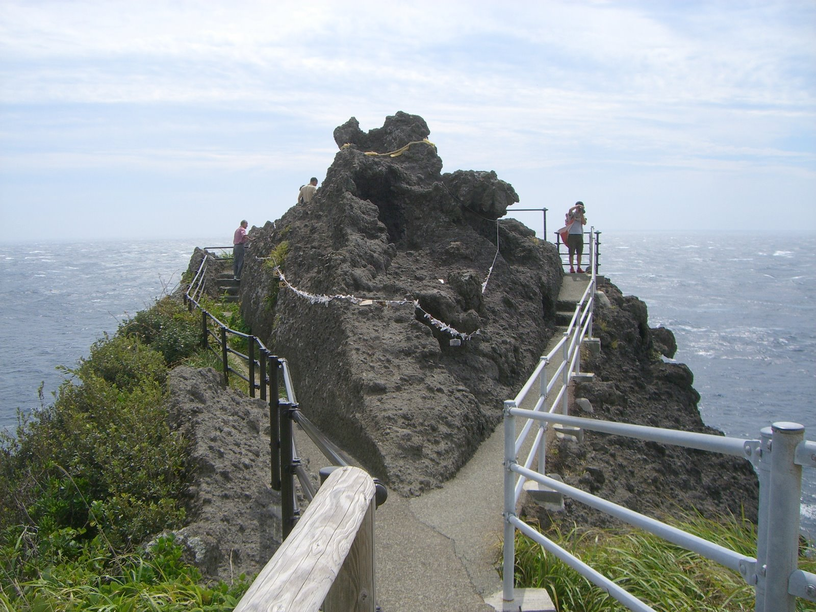 石廊崎の先端。Panoramioより転載。